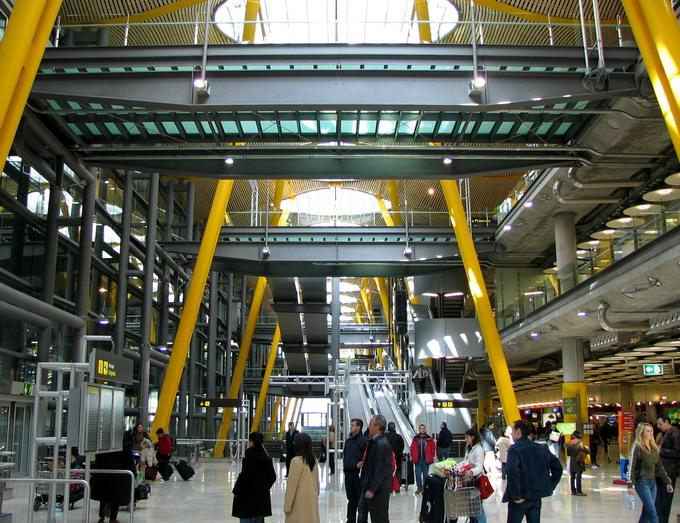 Inside Terminal 4 at Madrid Barajas Airport.